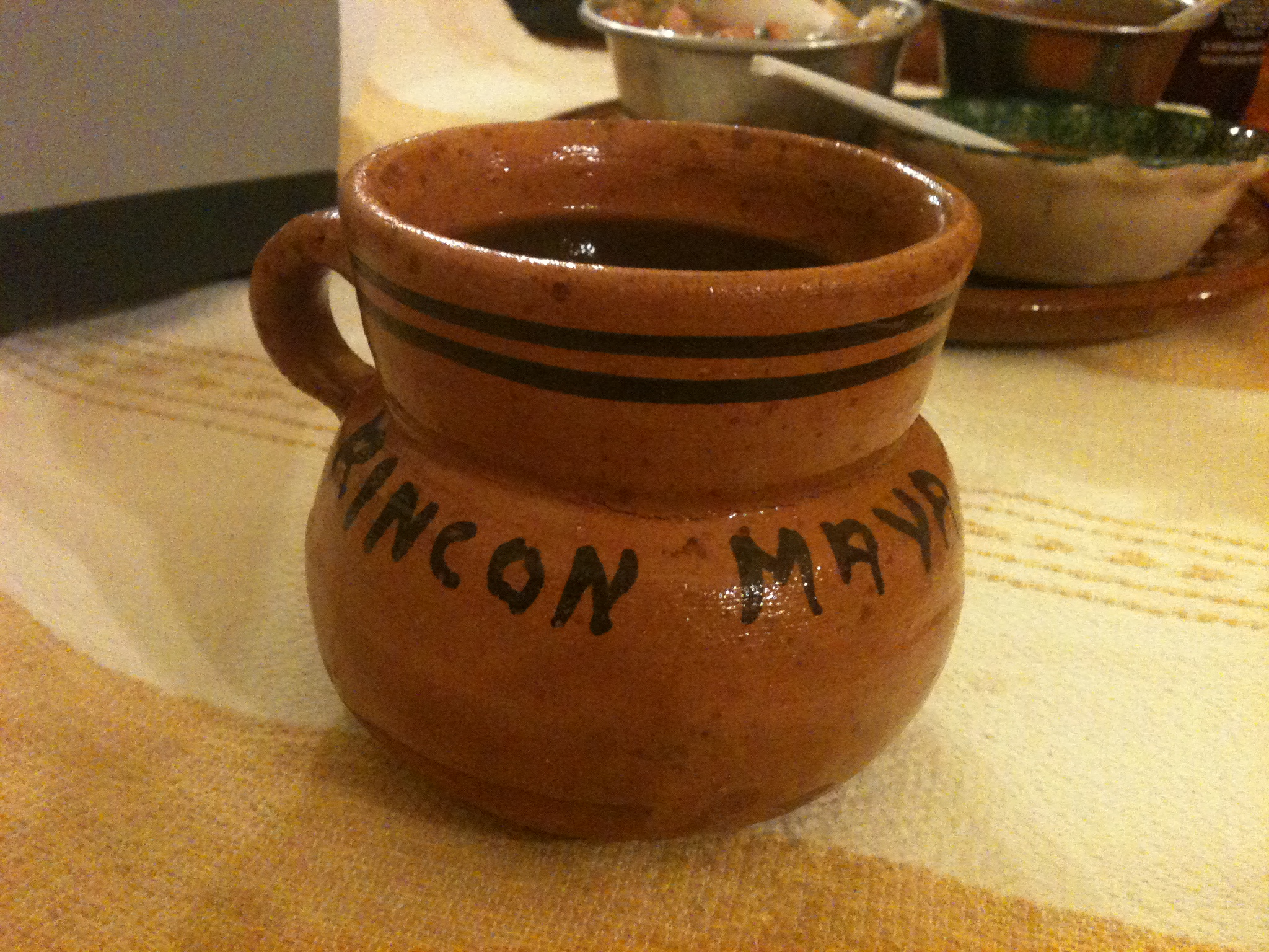 Café de olla